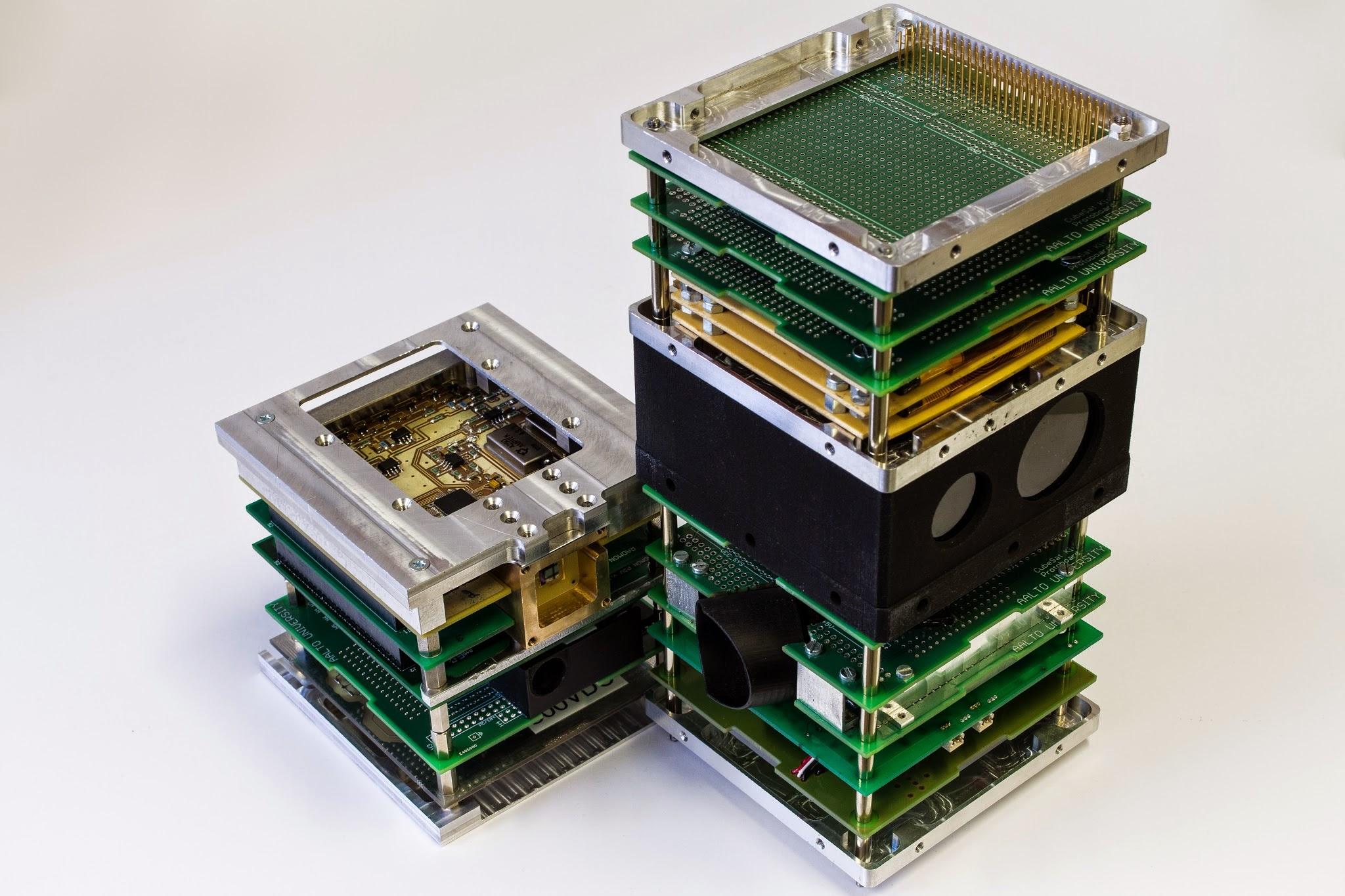 "Insinöörimalli" osina.